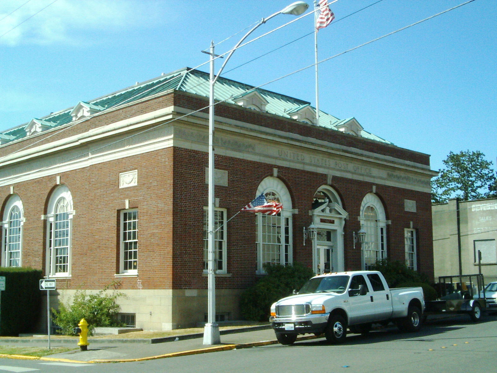 Historisches U.S. Post Office in Chehalis, Washington Sonstiges: ...